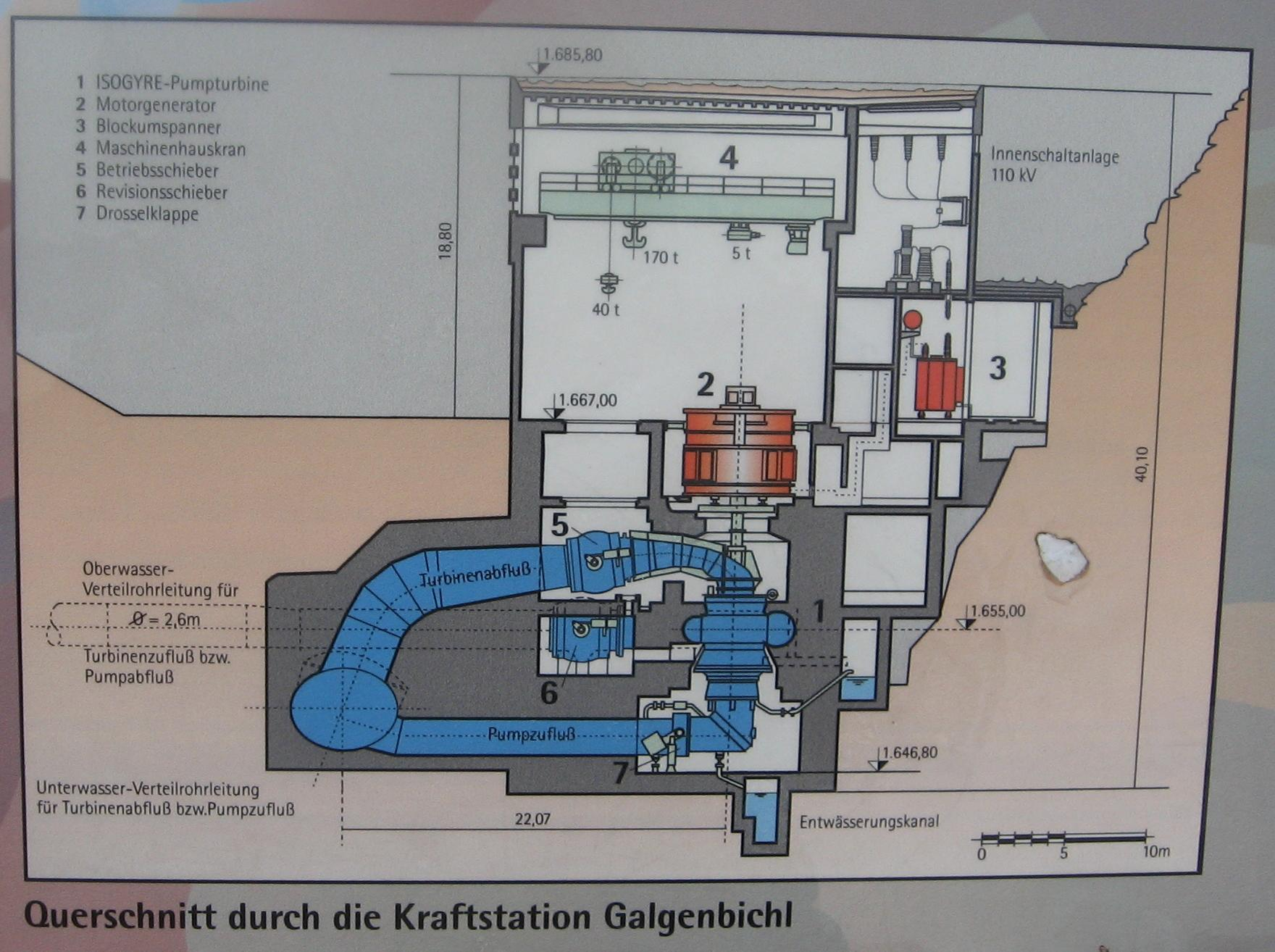 Fotografie einer unter Panoramafreiheit fallenden Tafel in der Nähe der Kölnbrein- Talsperre (Österreich) der Maltakraftwerke. Die Tafel trägt die Überschrift „Das Kraftwerk Malta-Oberstufe“.